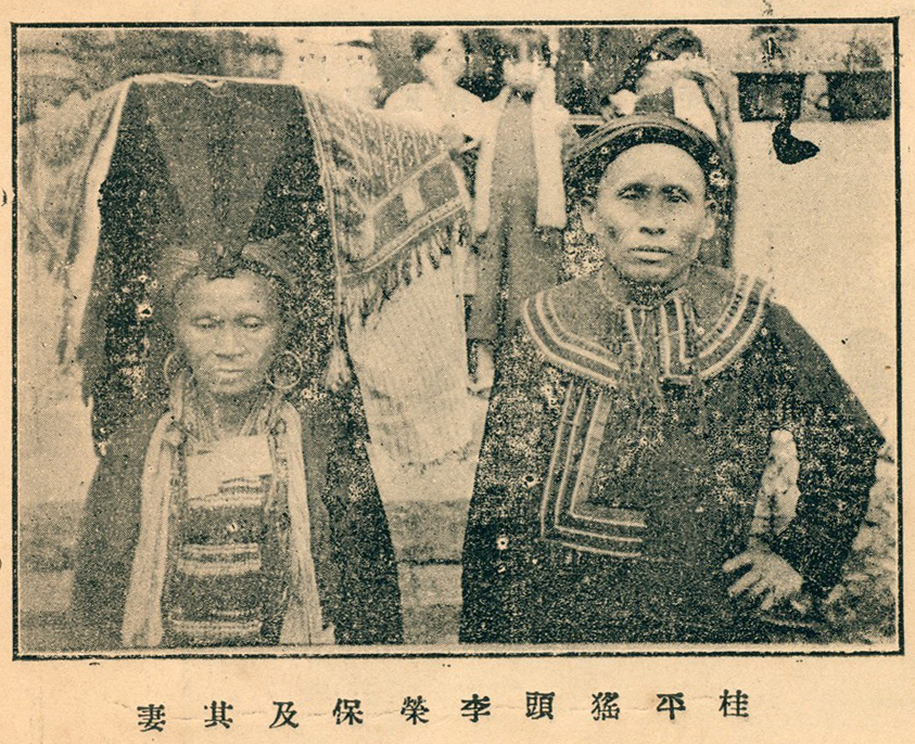 中文（台灣）: 南寧民國日報 民國廿二年元旦特刊一年來之廣西